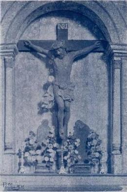 "Imagem do Senhor do Bom Fim", freguesia e concelho de Vila do Porto, ilha de Santa Maria, Açores, in Álbum Açoriano, fascículo nº 33, 1903, p. 258.